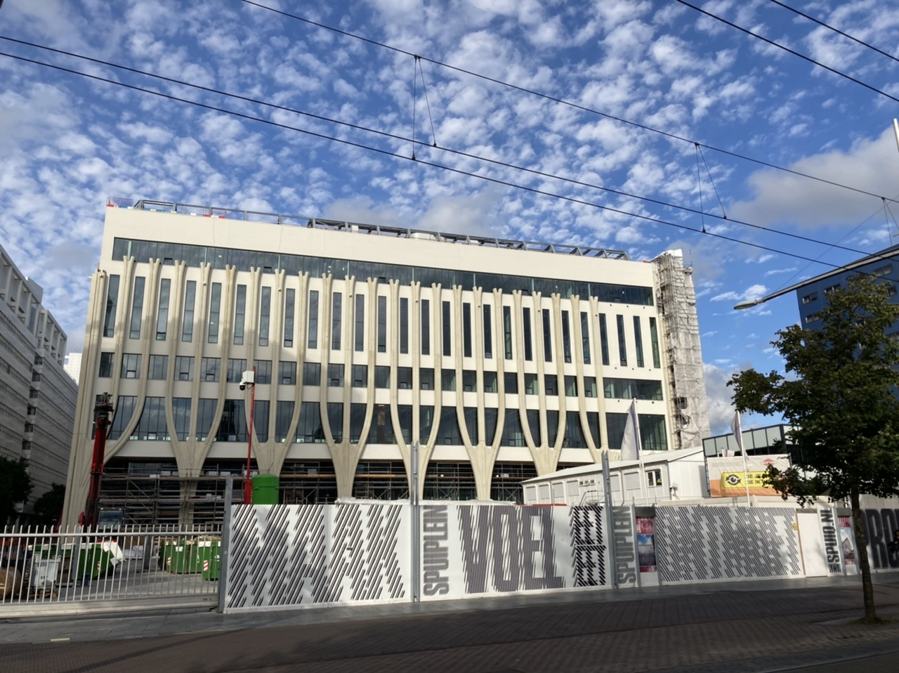 Cultuurhuis Amare tijdens de bouw in augustus 2020.